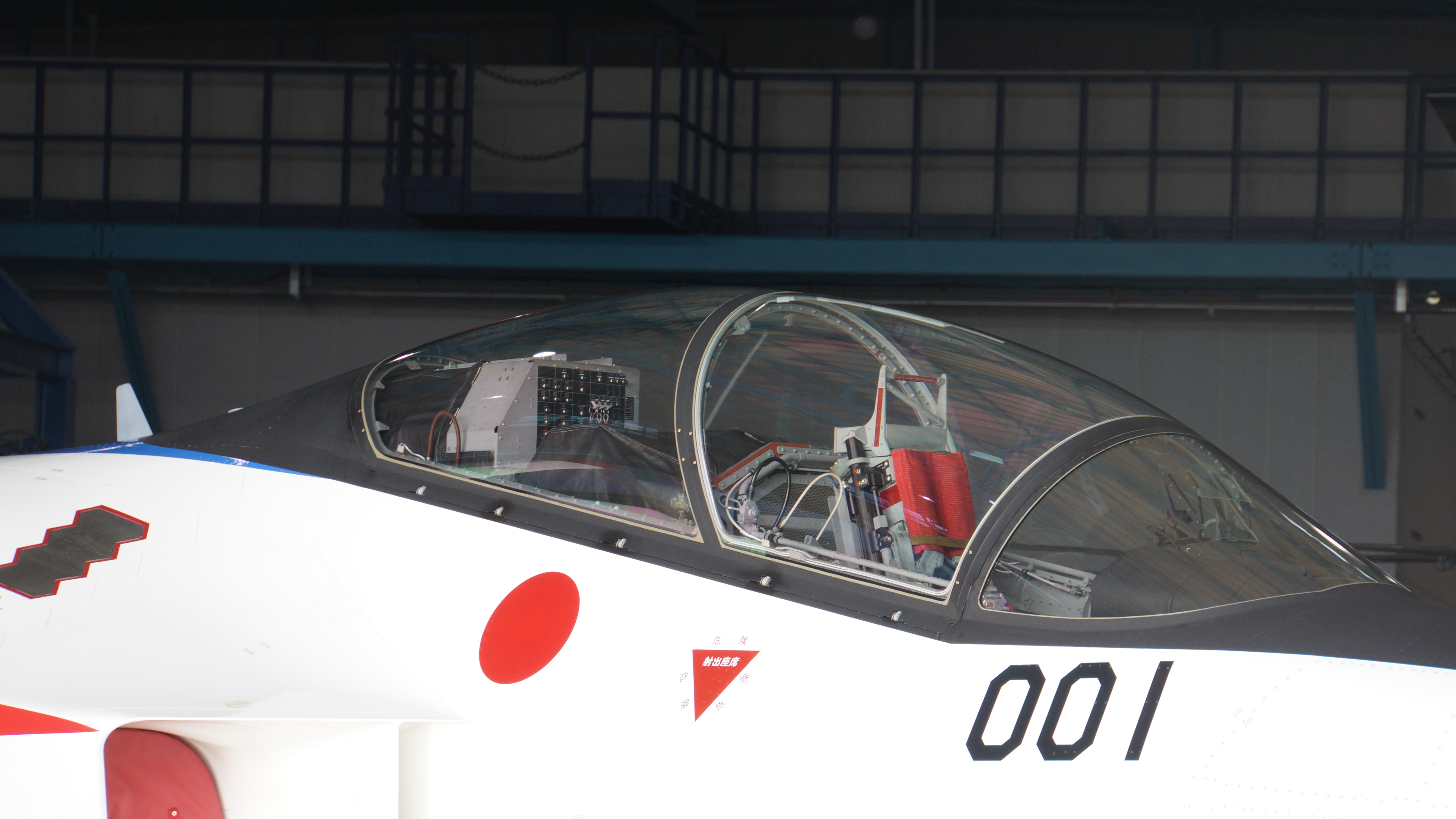 三菱 先進技術実証機 X-2（51-0001号機） キャノピー 右前面。2016年10月30日 航空自衛隊岐阜基地にて。